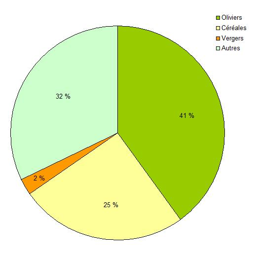 Utilisation des terres agricoles à Archidona (Espagne).